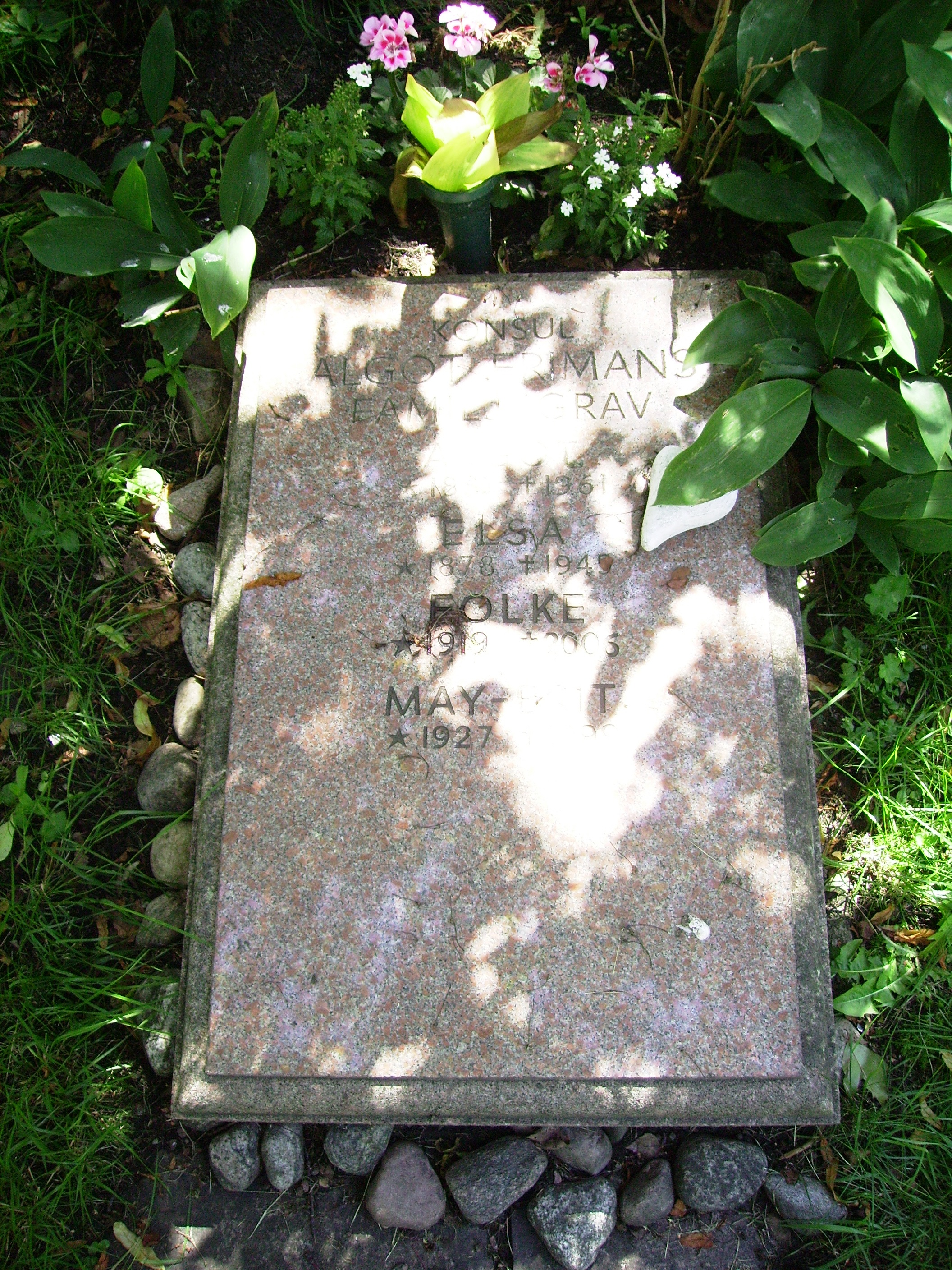 Picture of Algot Friman's grave at Östra kyrkogården in Gothenburg.